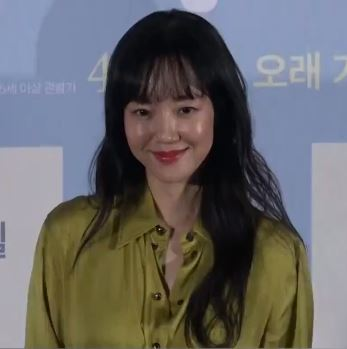 [언론시사회] 빛나는 꿀피부